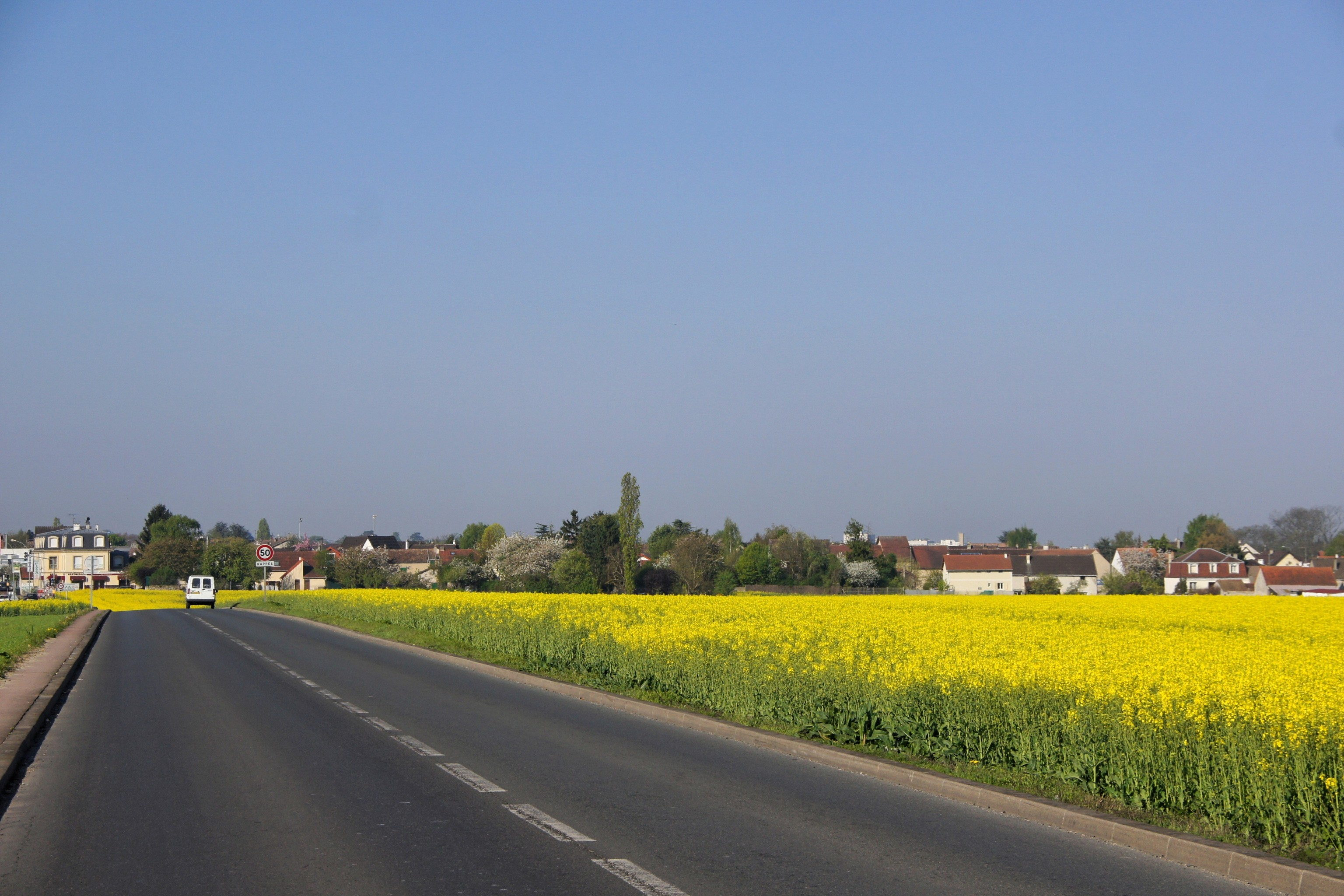 Noiseau vu depuis la route de La Queue-en-Brie